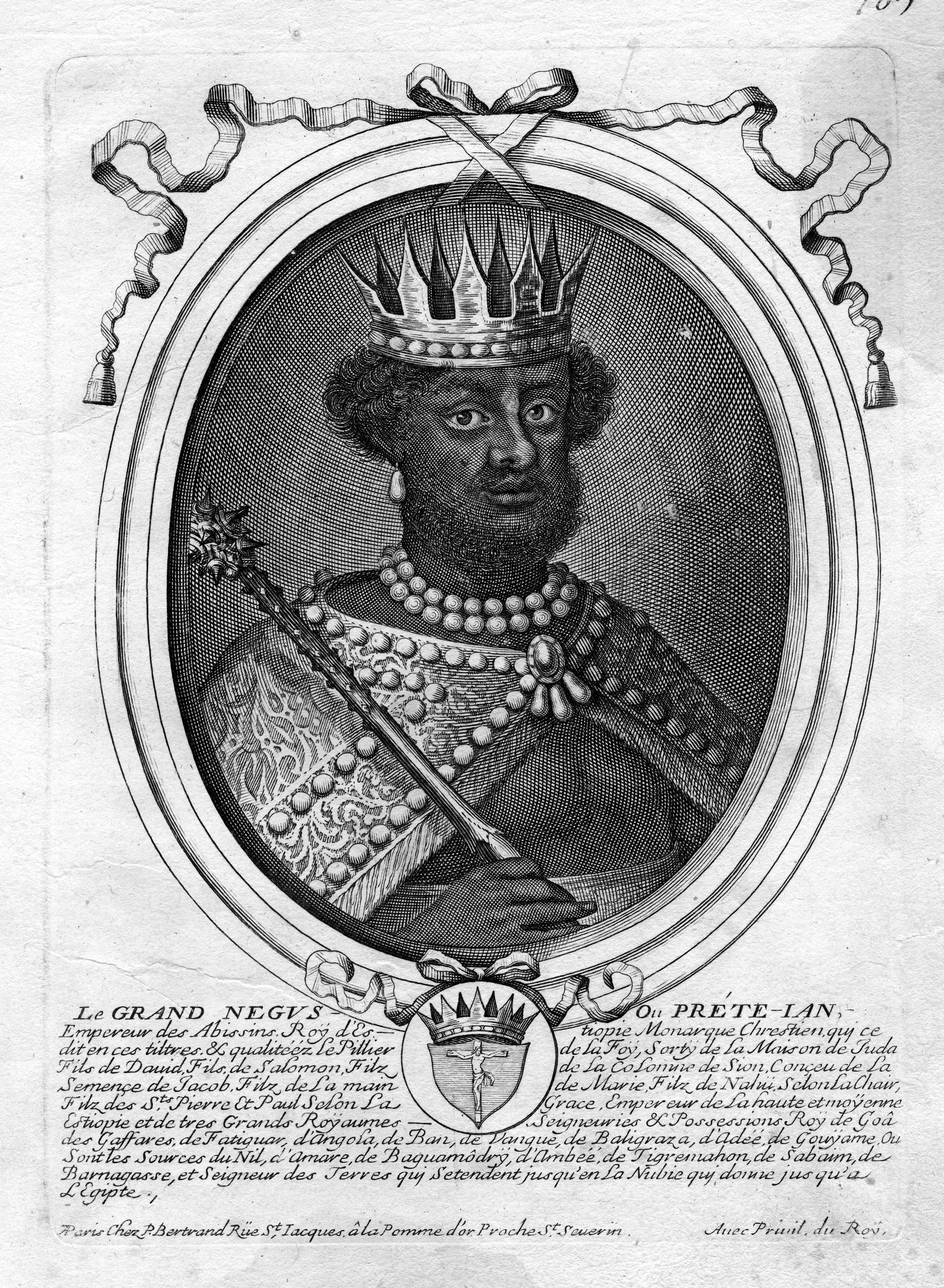 portrait gravé